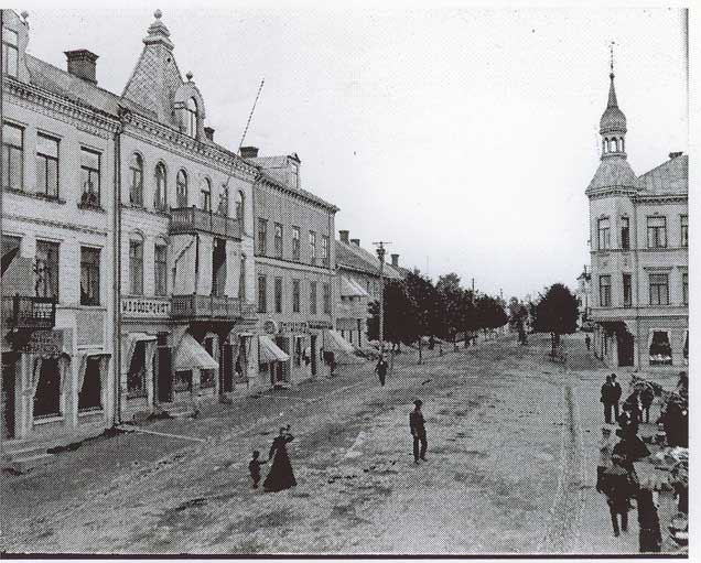 Östra Storgatan, Säffle cirka 1895-1900